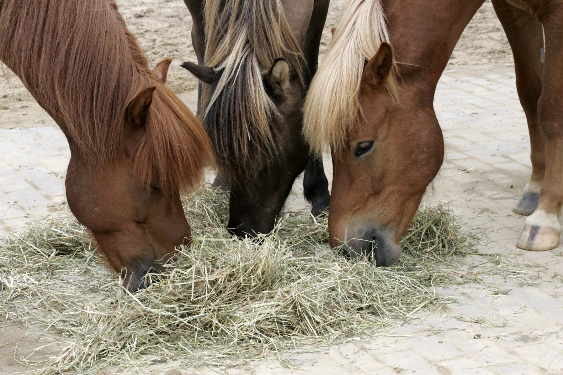 Ponys fressen Heu, Ponies feeding hay